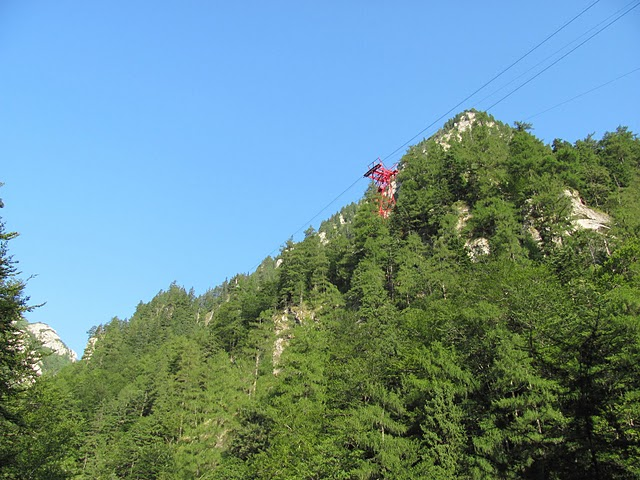 Vedere Bucegi si telecabina de pe traseul Jepii Mici